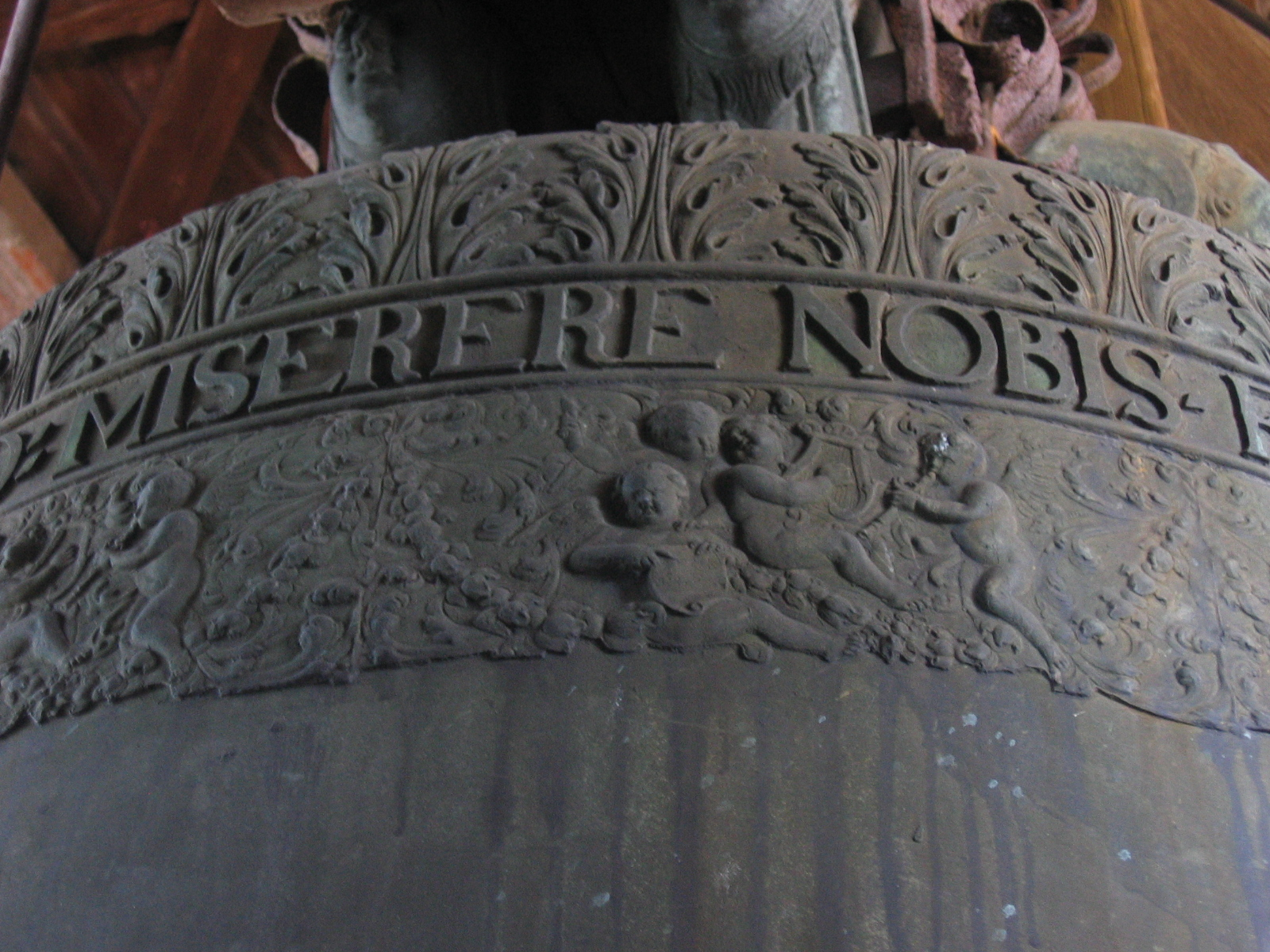 Detail der Inschrift auf der Freisinger Korbiniansglocke.